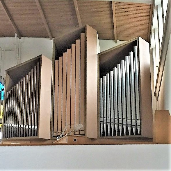 Schuster-Orgel in St. Magdalena Ottobrunn